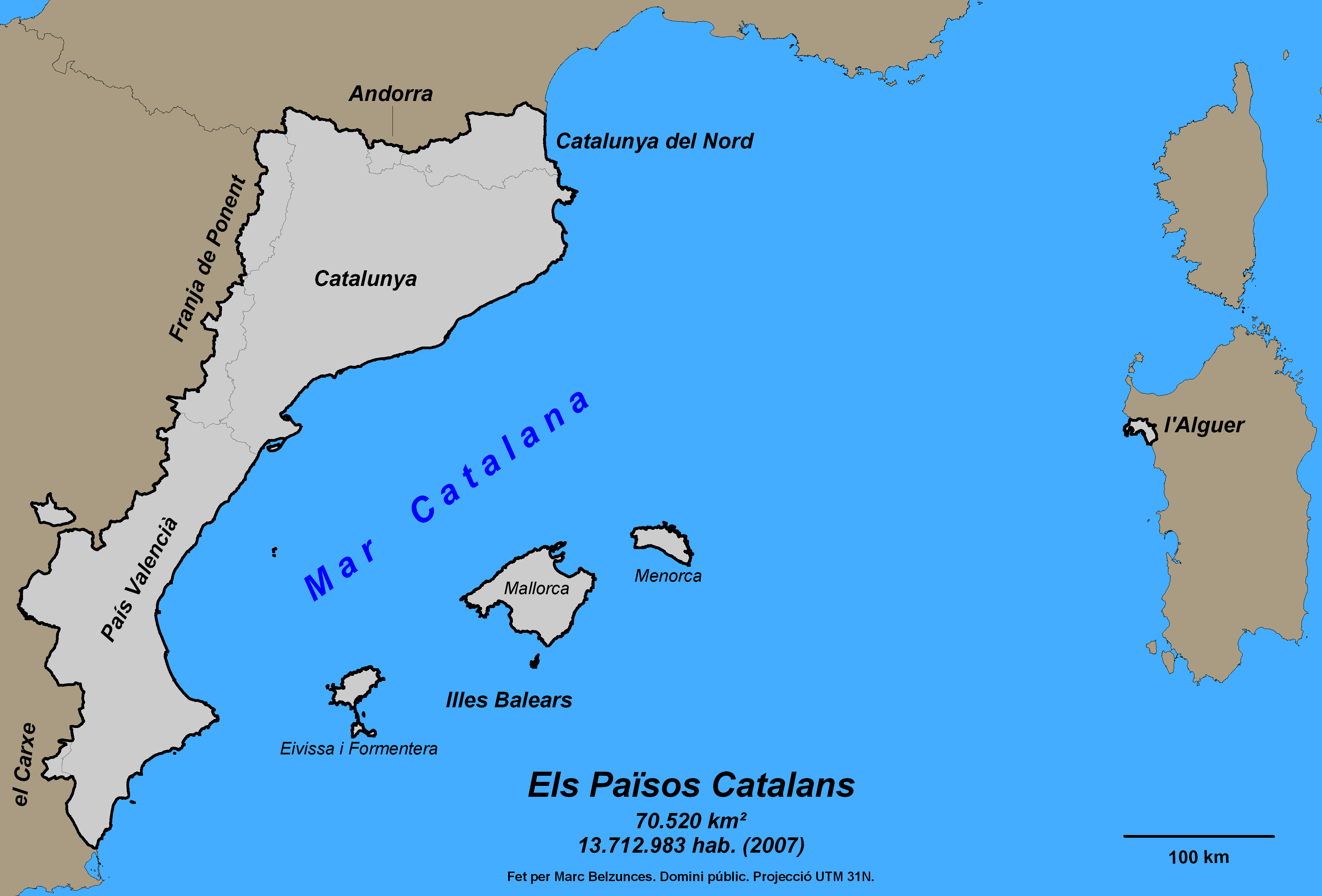 Els Països Catalans (amb noms). The Catalan Countries with names.